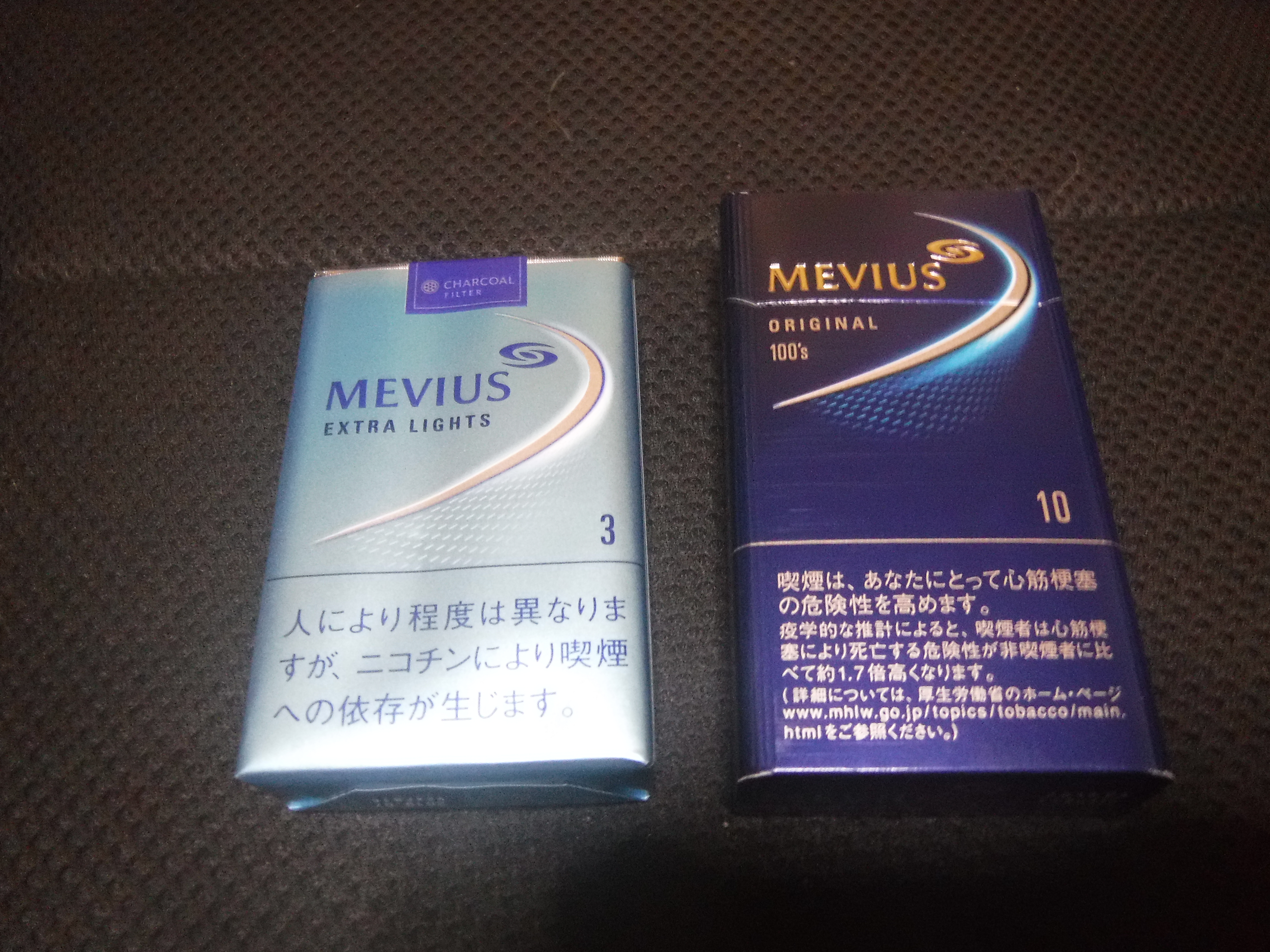 左:Mevius Extra Lights、右:Mevius 100's Box